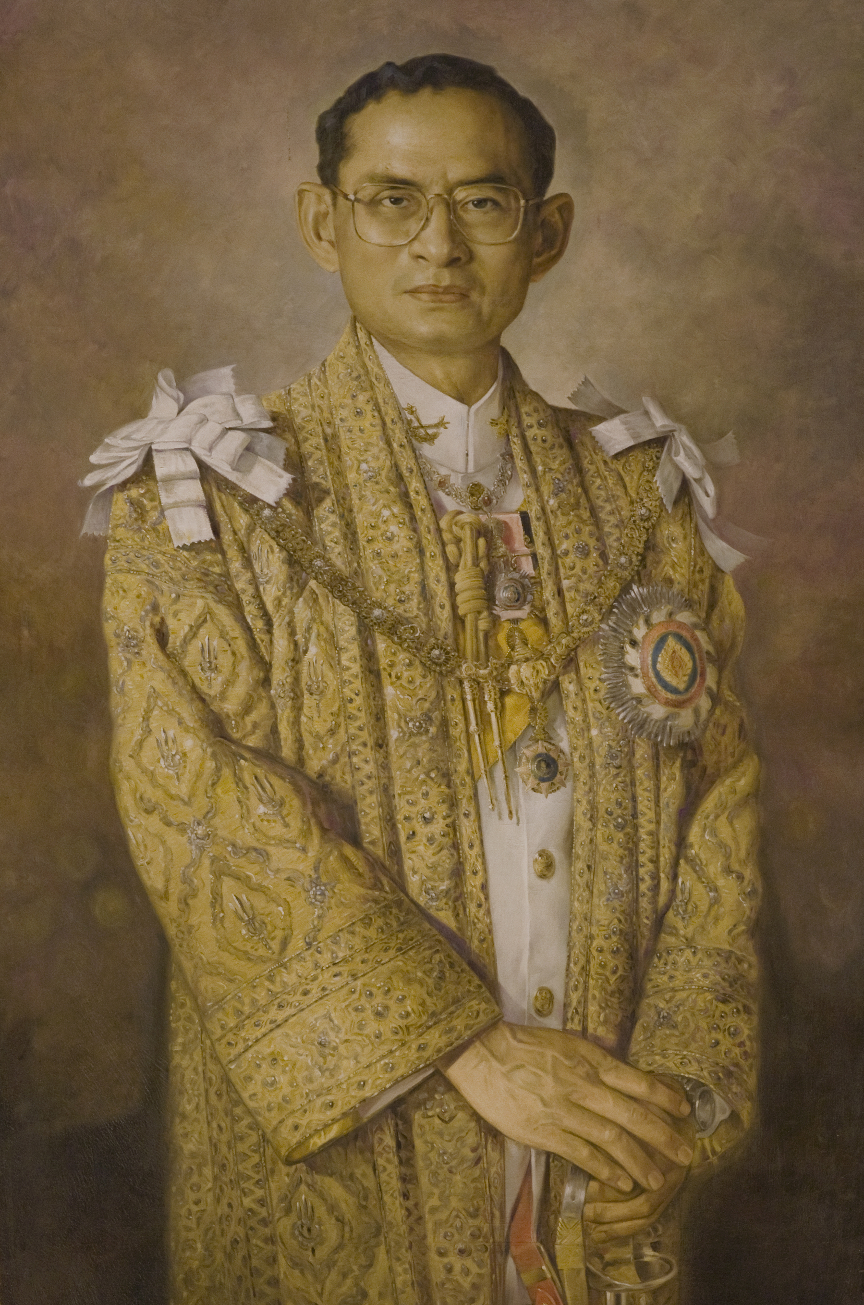 นายกรัฐมนตรี และภริยา เฝ้าฯ รับเสด็จ สมเด็จพระเทพรัตนราชสุดาฯ สยามบรมราชกุมารี เสด็จพระราชดำเนินพร้อมด้วยพระบรมวงศานุวงศ์ในงานสโมสรสันนิบาตเฉลิมพระเกียรติพระบาทสมเด็จพระเจ้าอยู่หัว เนื่องในโอกาสมหามงคลเฉลิม พระเกียรติพระชนมพรรษา วันอังคารที่ 7 ธันวาคม พ.ศ.2553 (Photographer attached to the Prime Minister of the Kingdom of Thailand : Peerapat Wimolrungkarat / พีรพัฒน์ วิมลรังครัตน์) @is50mm